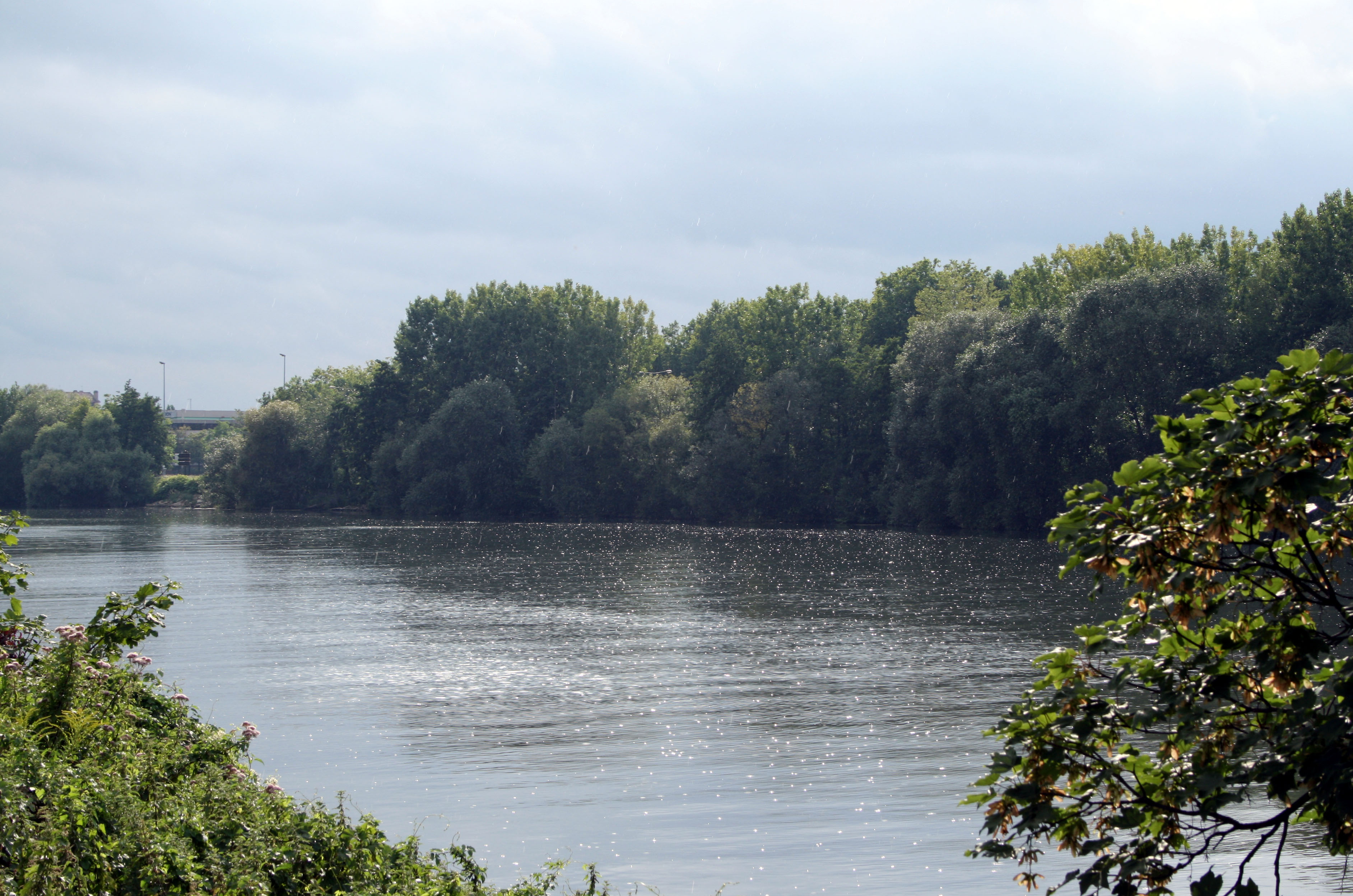 Seine à Argenteuil